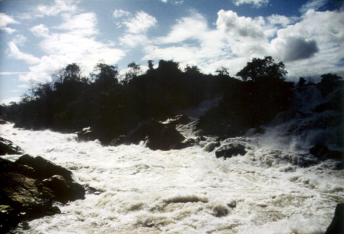 Kapichira Fälle des Shire in Malawi in Afrika